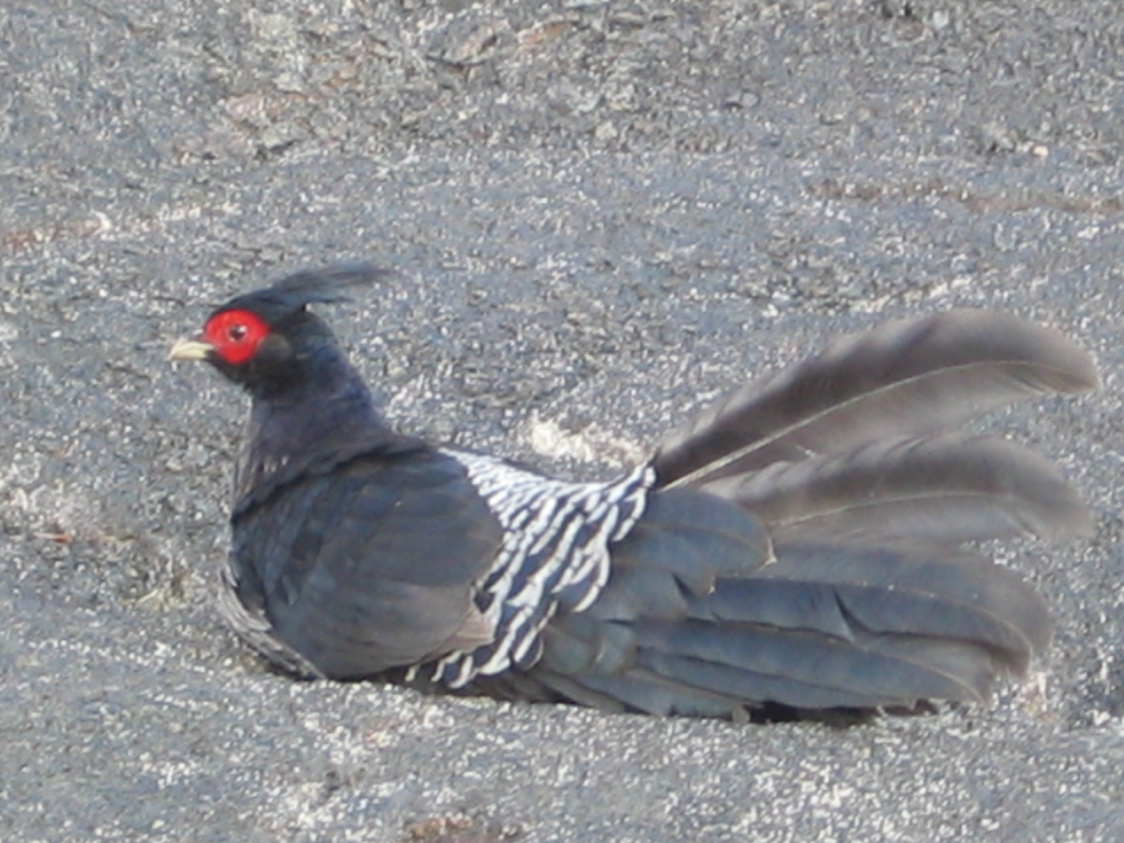 Kalij Pheasant (Lophura leucomelanos)